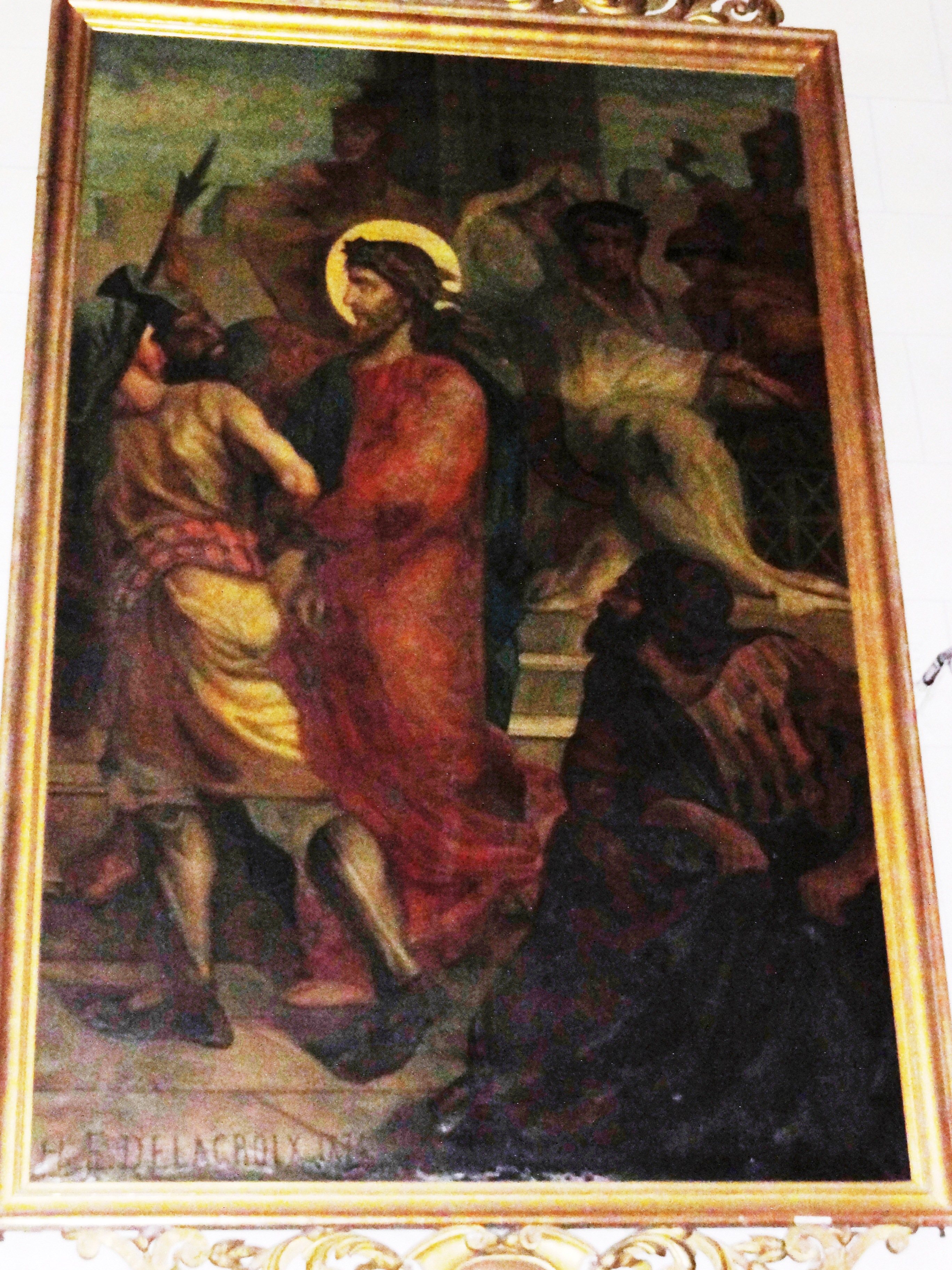 Solesmes (Nord, Fr) chemin de Croix par Delacroix, station 01